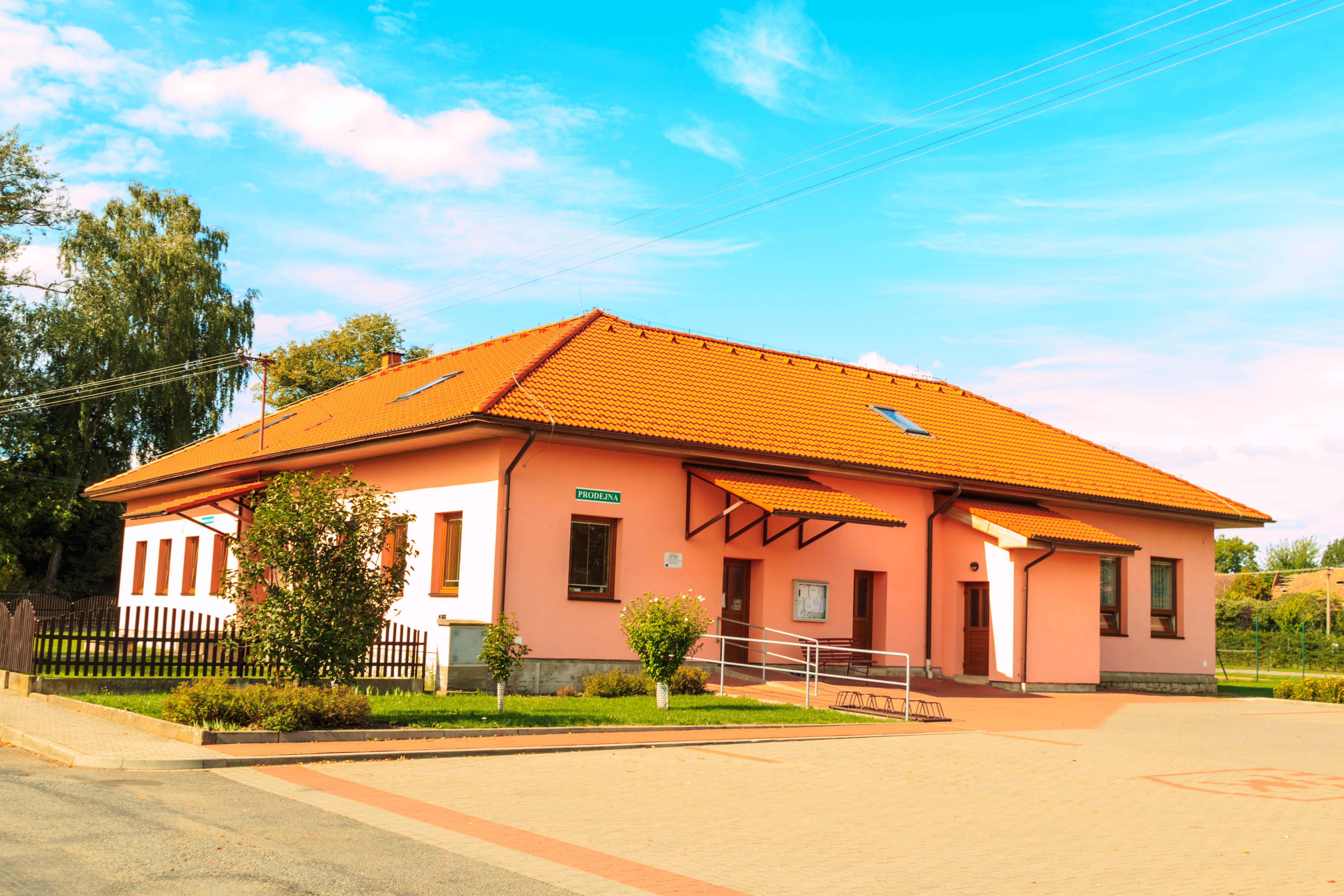 Bořice hospoda